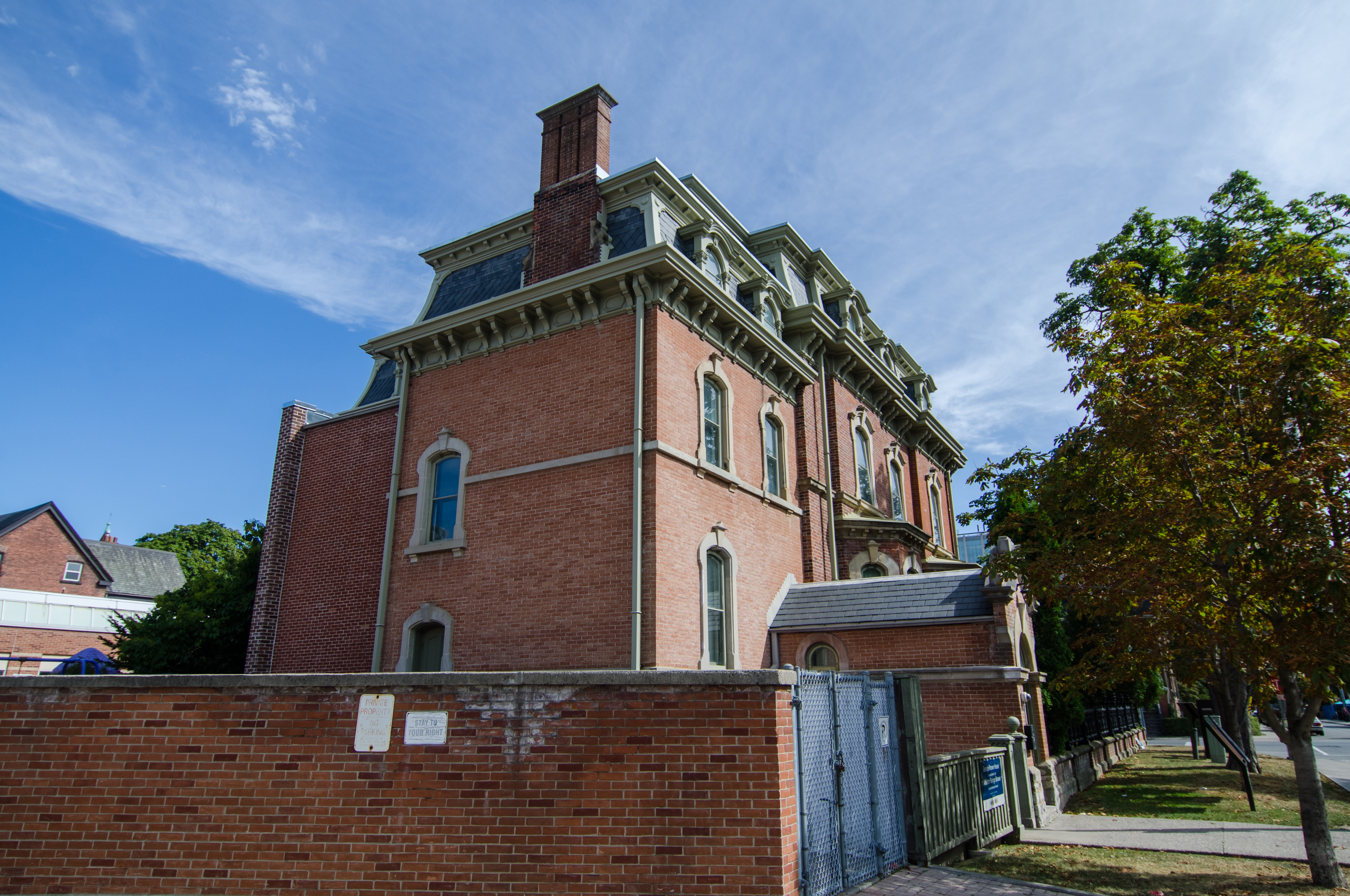 Seen in Shadowhunters episode #205.